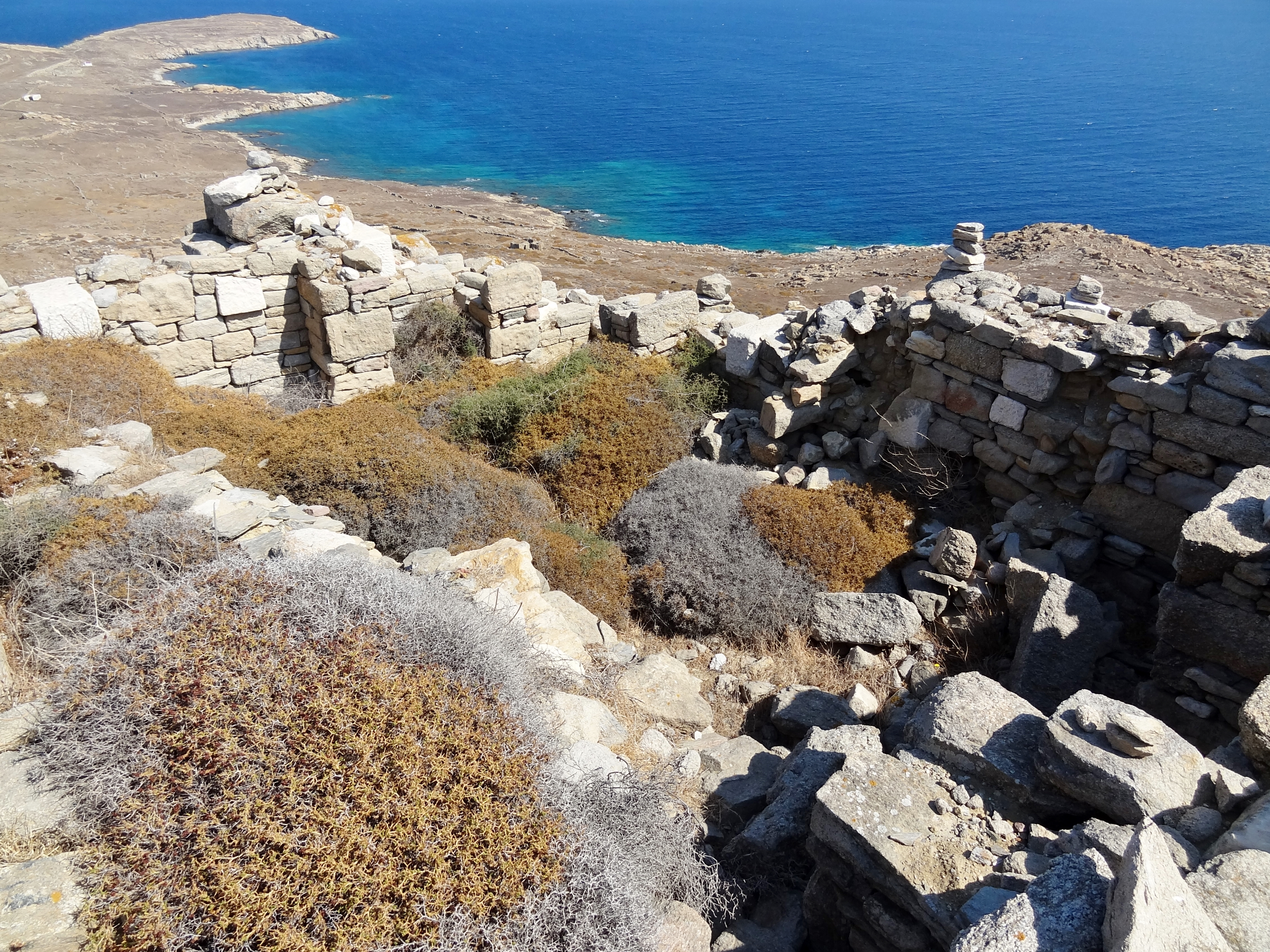 Raum ψ und Fundamente der nordöstlichen Ecke des Peribolos auf dem Kynthos der Ausgrabungsstätte von Delos, Kykladen, Griechenland